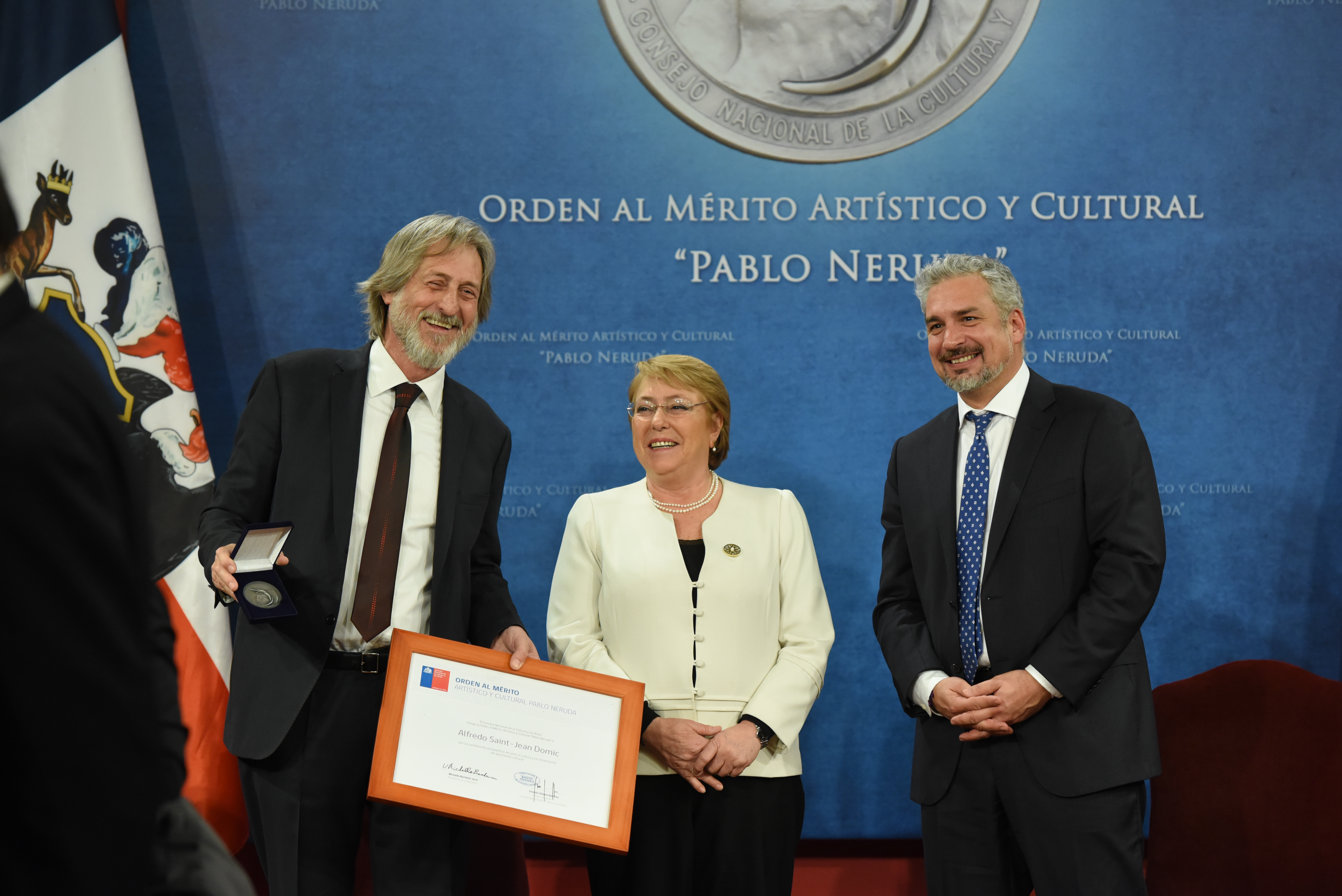 Premiación Orden al merito artistico y cultural Pablo Neruda, Alfredo Saint-Jean Domic fue el galardonado. Salon Montt Varas, La Moneda. fotos : Rolando Morales